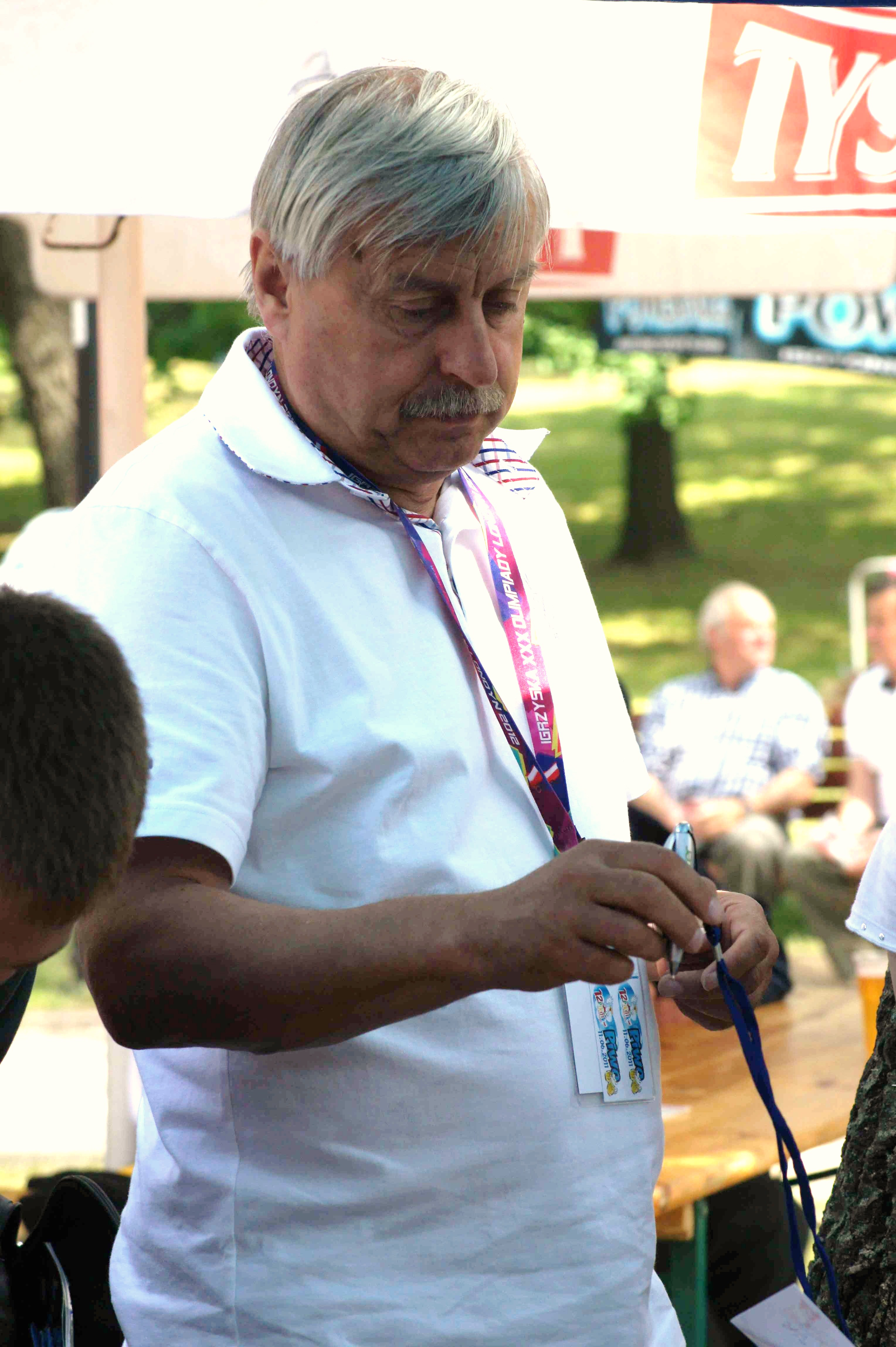 Kazimierz Kmiecik, piłkarz